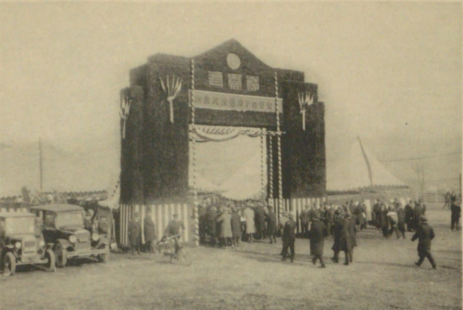 1927年（昭和2年）12月29日の東京地下鉄道（現・東京地下鉄）銀座線の開通披露式会場（上野公園竹の台広場）。